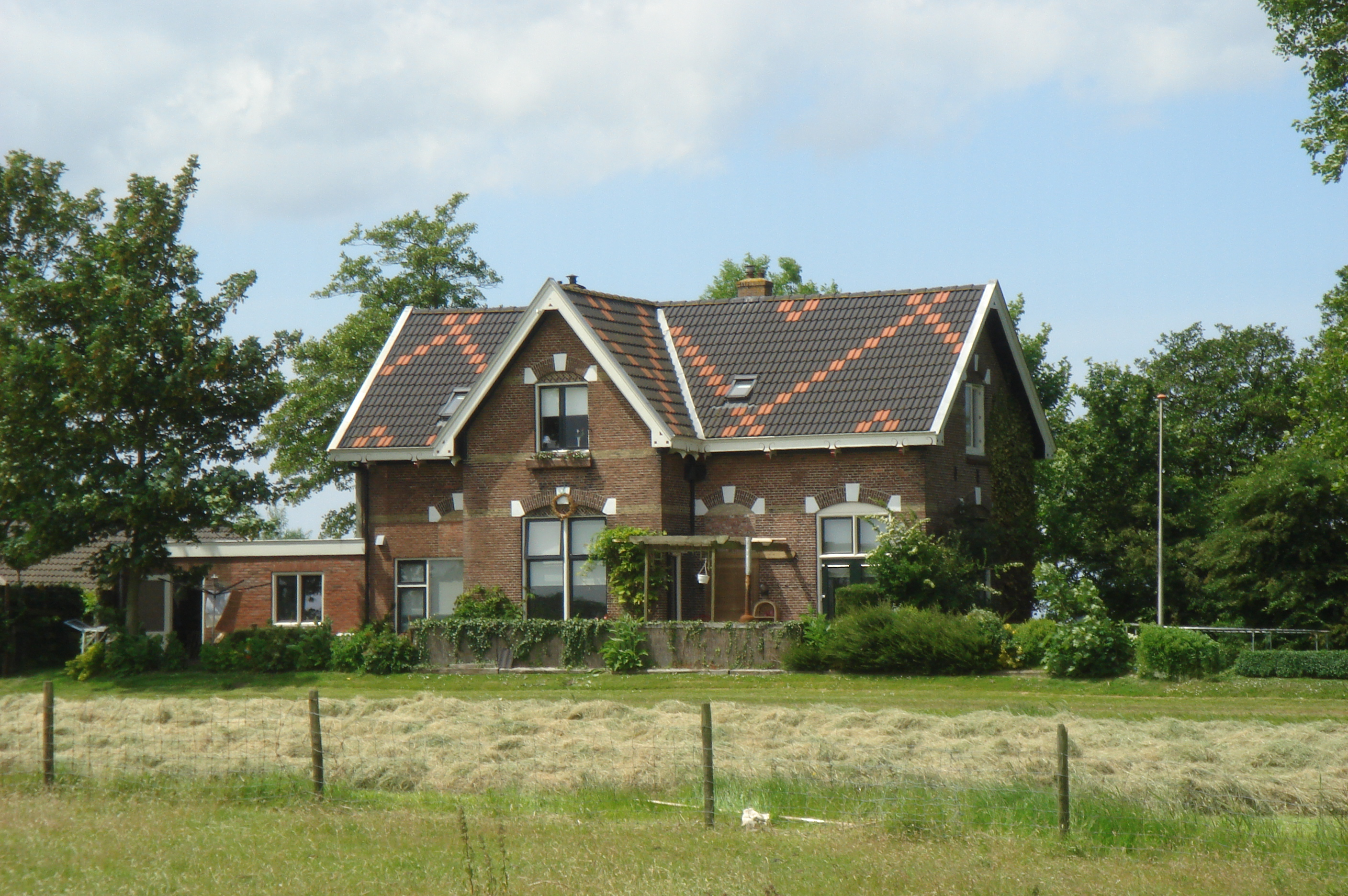 Voormalig station Hijum (foto: Daniel van der Ree)